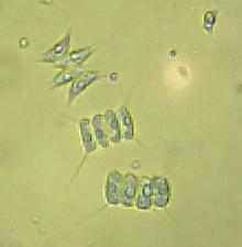 上：イカダモ類3種. 上：Scenedesmus sp. 中・下：Desmodesmus quadricanda.